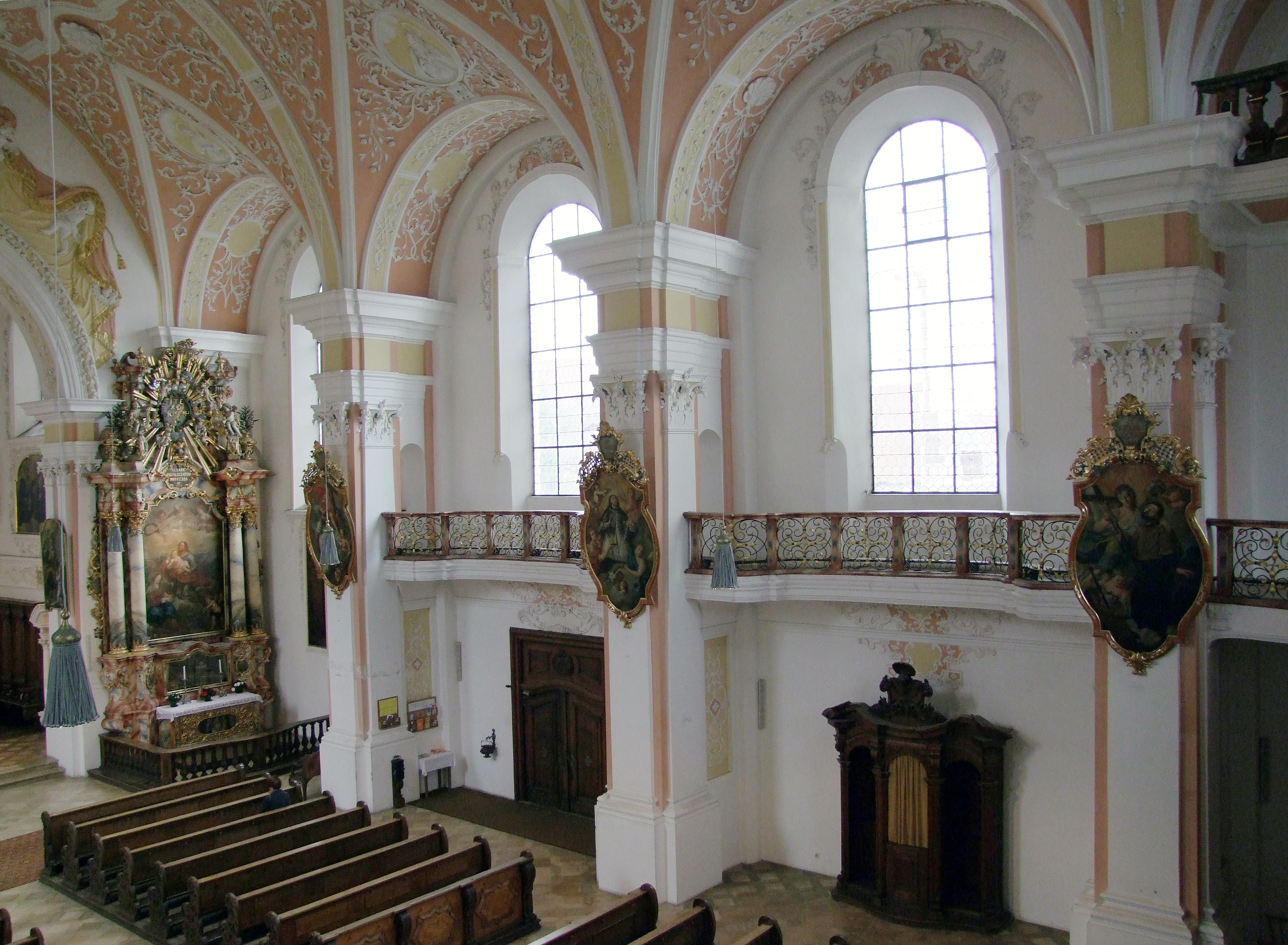 Mariä Verkündigung im oberschwäbischen Mindelheim. Ehemalige Augustiner, dann Jesuitenklosterkirche.